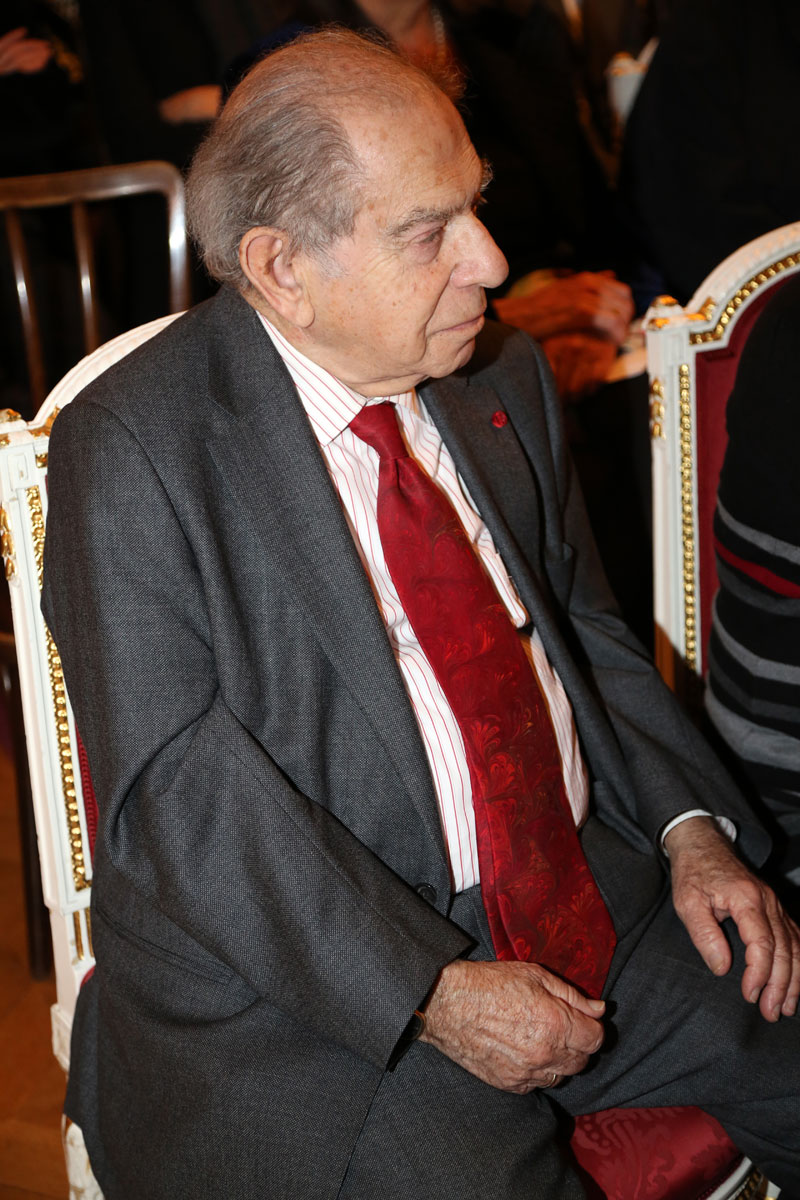 Paul Lendvai-2896